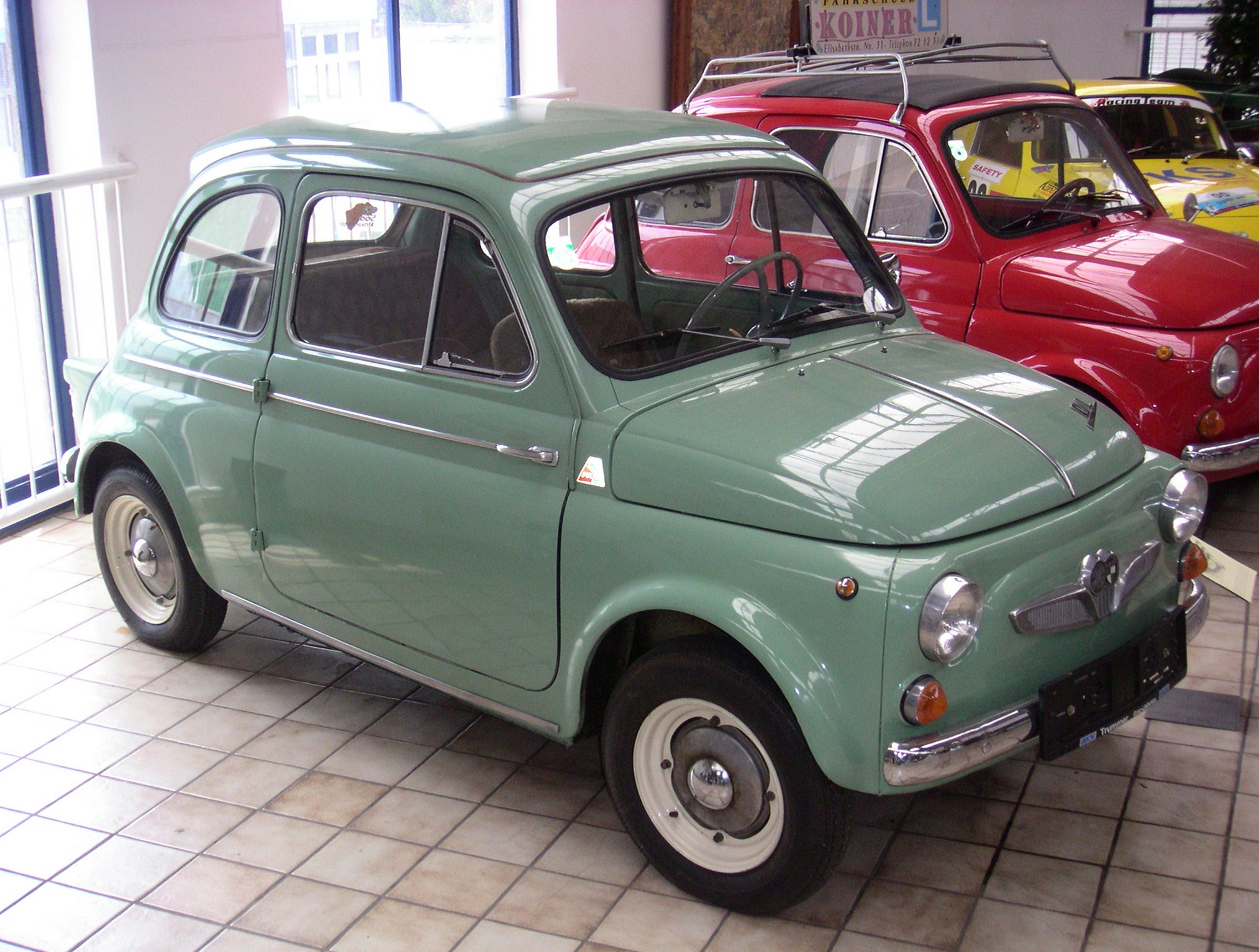 Steyr-Puch 500 DL, ausgestellt im Johann Puch Museum Graz, Mai 2004